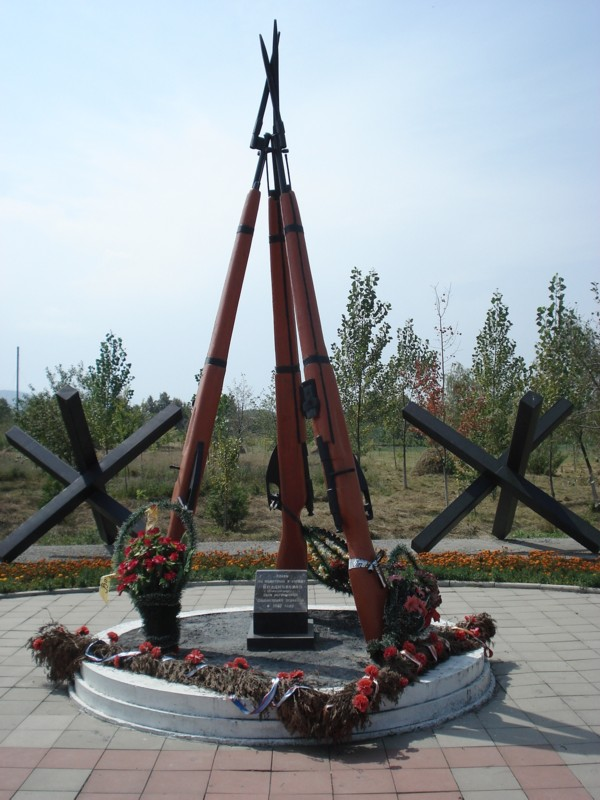 На этом месте под Владикавказом были остановлены немецкие солдаты в 1942 году.